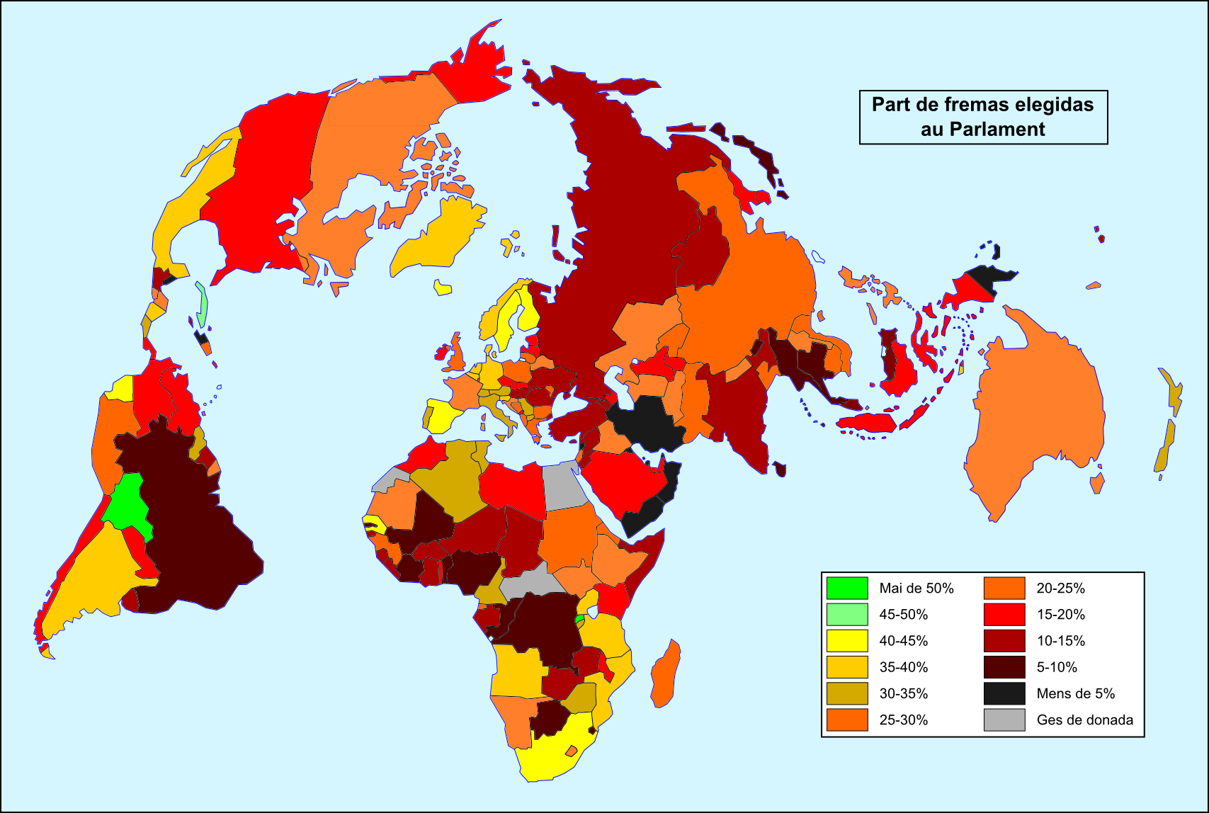 Part de fremas elegidas dins lei parlaments nacionaus en 2016.